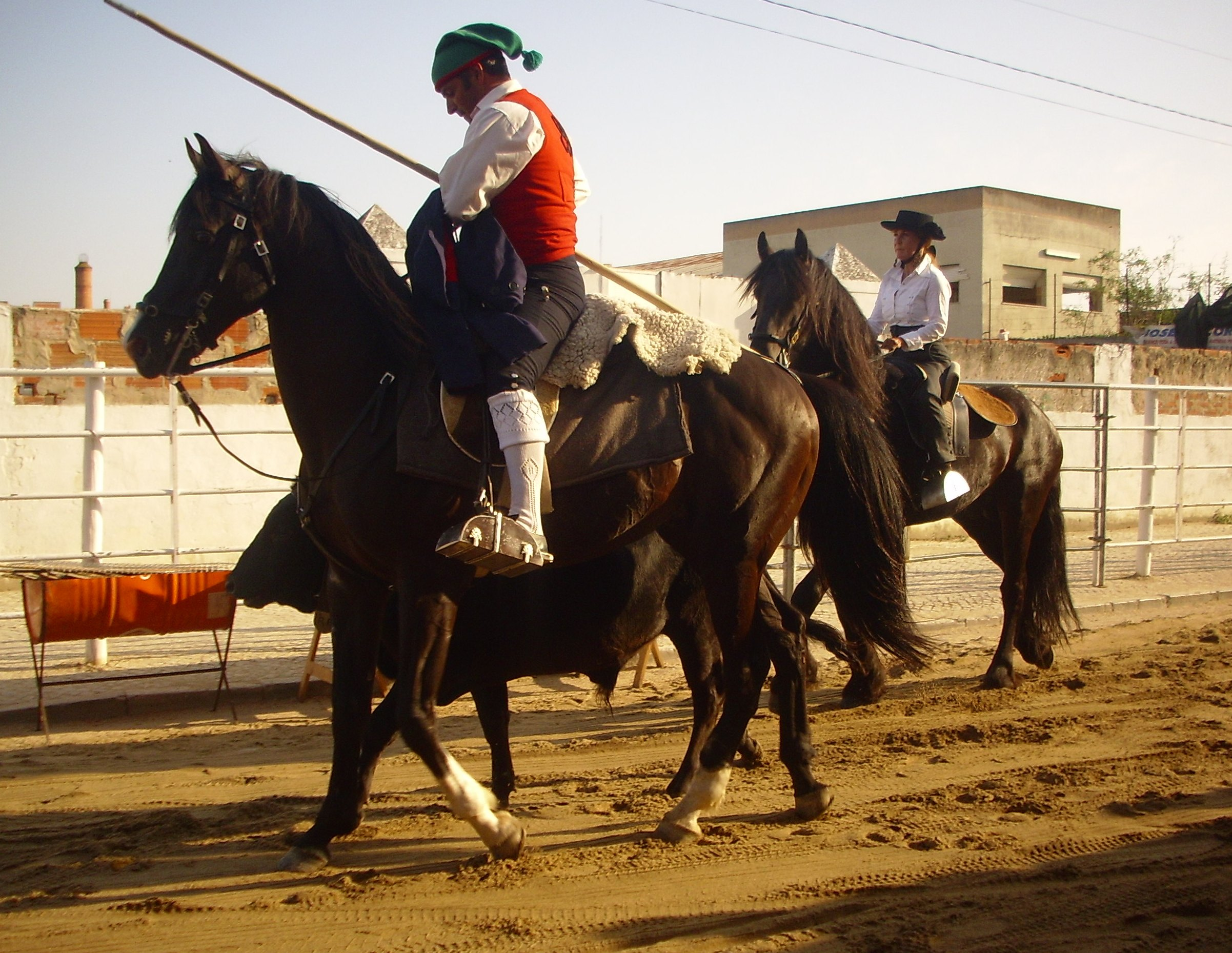 Festas de S. Pedro - Montijo